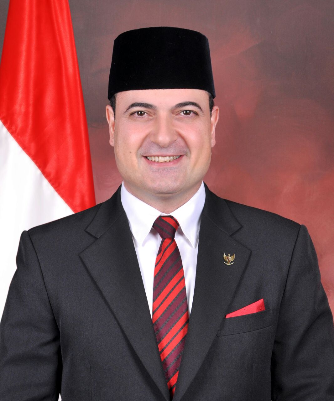 Sam Aliano, Ketua Umum Pengusaha Muda Indonesia